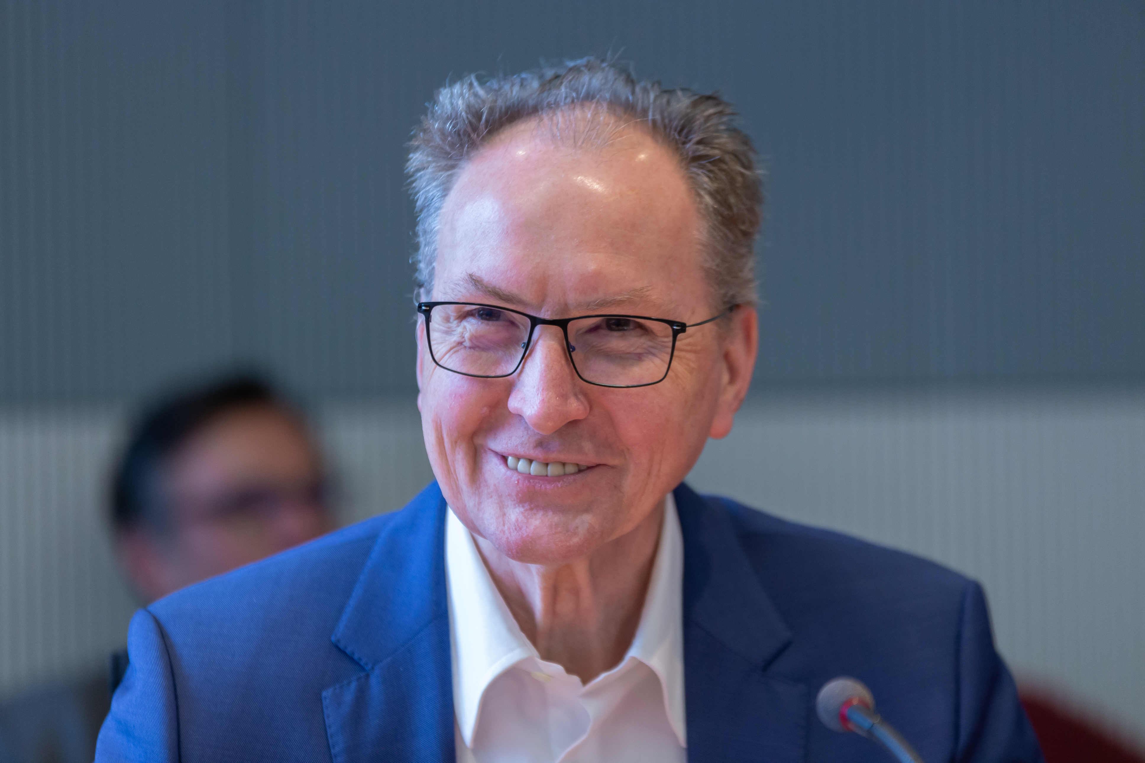 Deutscher Bundestag; Jörg Cezanne, Die Linke, Berichterstatter im Untersuchungsausschuss "PKW-Maut"